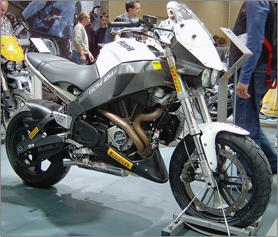 Buell XB12X Ulysse